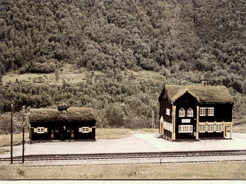 Beschreibung: Bahnhof Drivstua im Dovrefjell Fotograf: presse03, selbst erstellt 1975 Lizenz: GNU-FDL Kategorie:Bild:Bahnhof